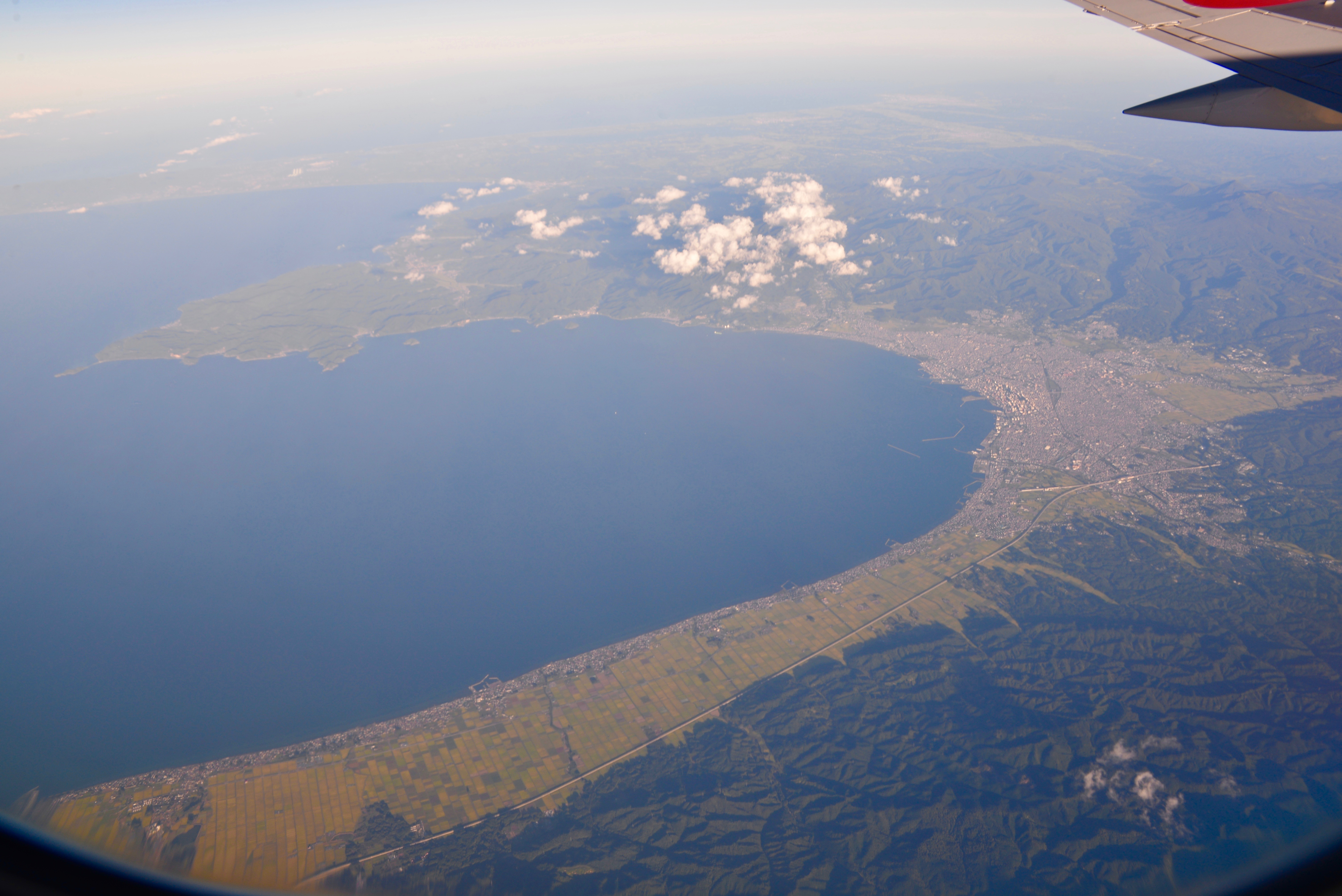 青森湾と青森平野